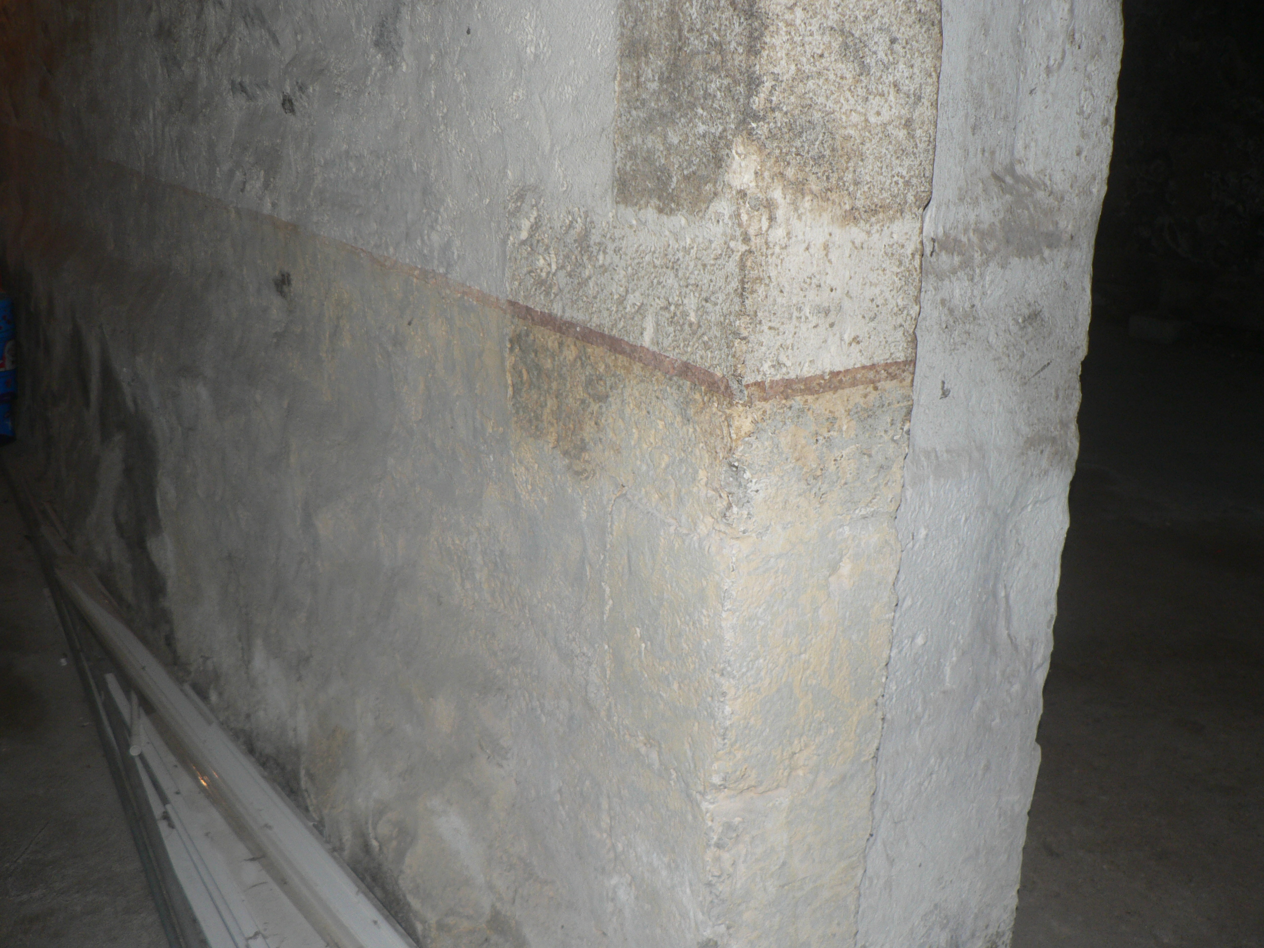 Mur Romain mis à jour en 1943. Aujourd'hui recouvert d'une habitation